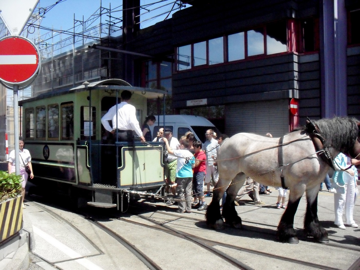 Tram hippomobile des TN. Tram importé pour le 150e anniversaire des TPG. Photographie prise au dépôt du Bachet-de-Pesay, à Lancy.